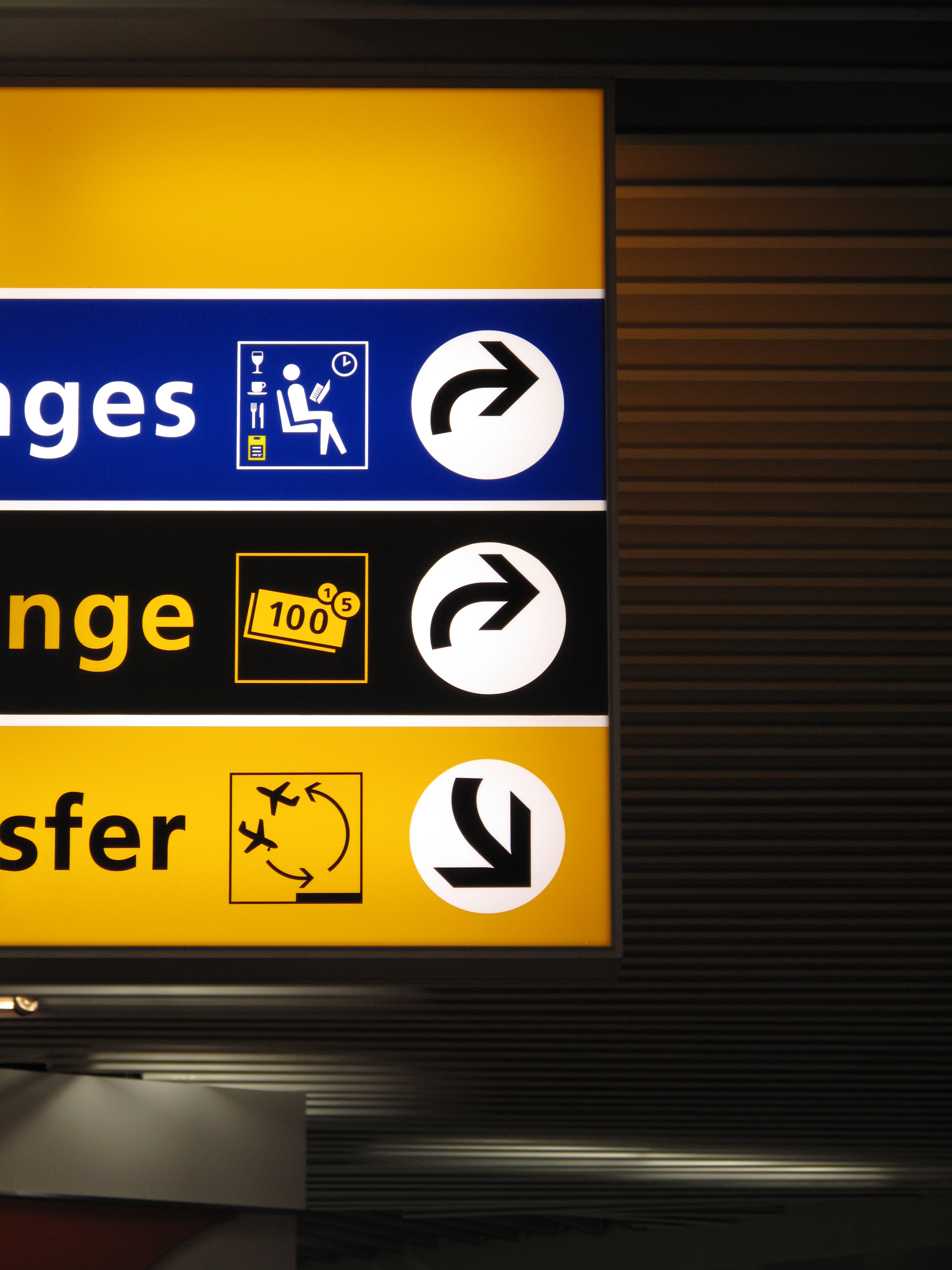 Elementos de señalización del aeropuerto de Schiphol (Amsterdam) diseñados por Paul Mijksenaar